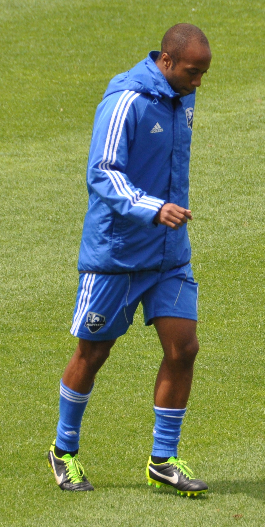 Impact Montréal - Real Salt Lake